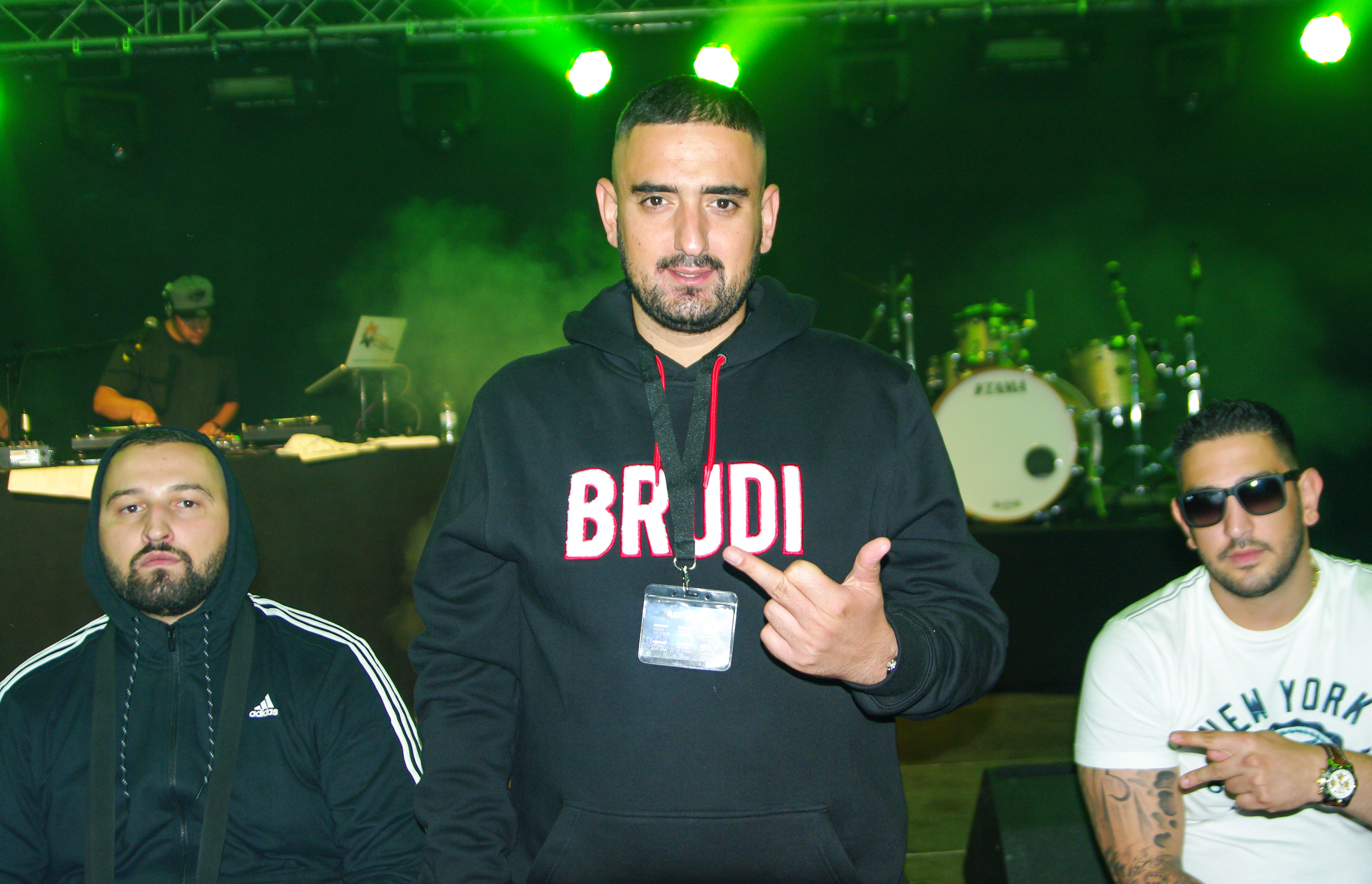 Place2Be Festival 2015 in Schwerin, u.a. mit Le Shuuk, Haftbefehl, BLINDERS, FIREBEATZ, Showtek, Vega, 187 STRASSENBANDE